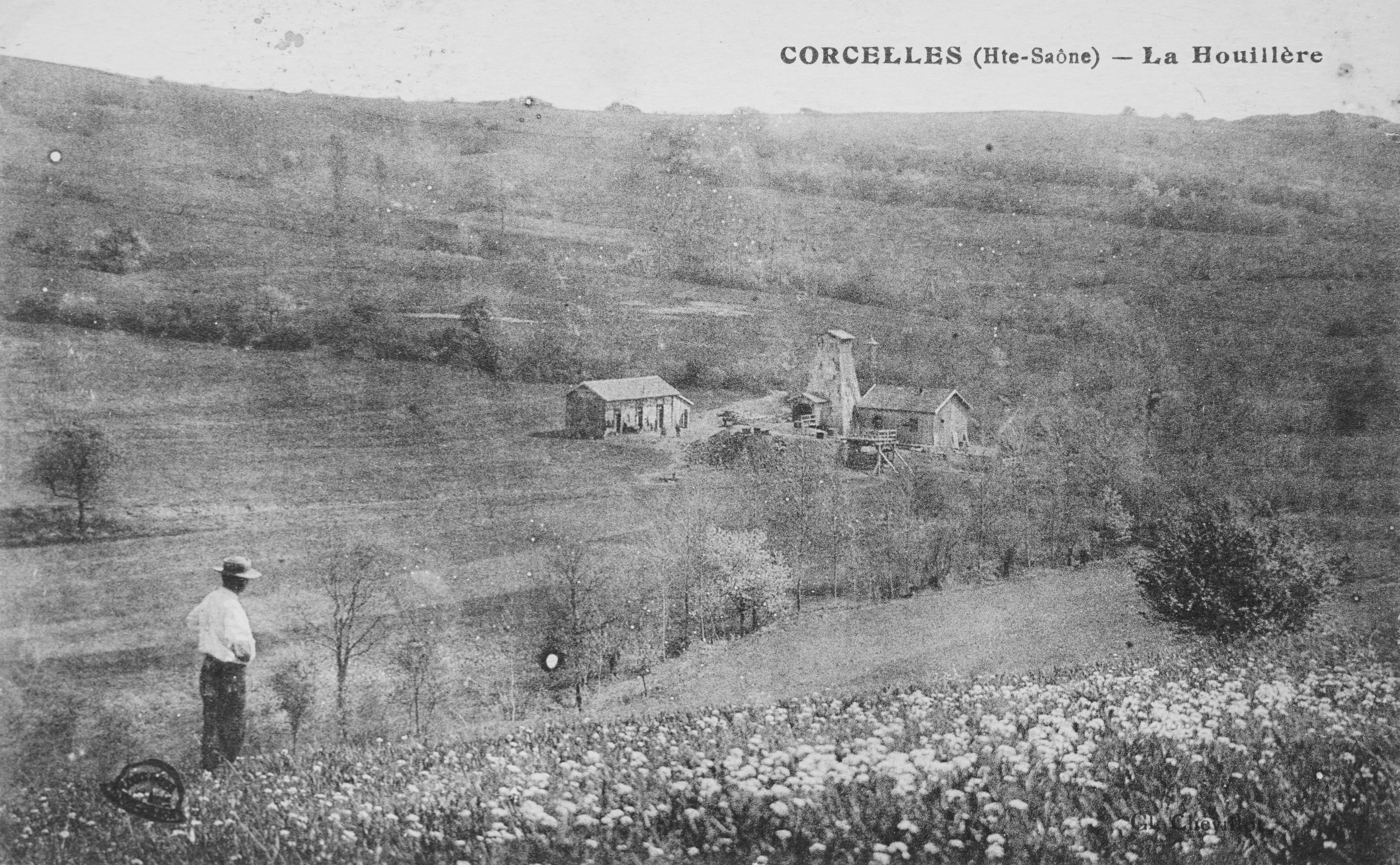 Infrastructures de surface du puits D de Corcelles (Saulnot) en Haute-Saône.